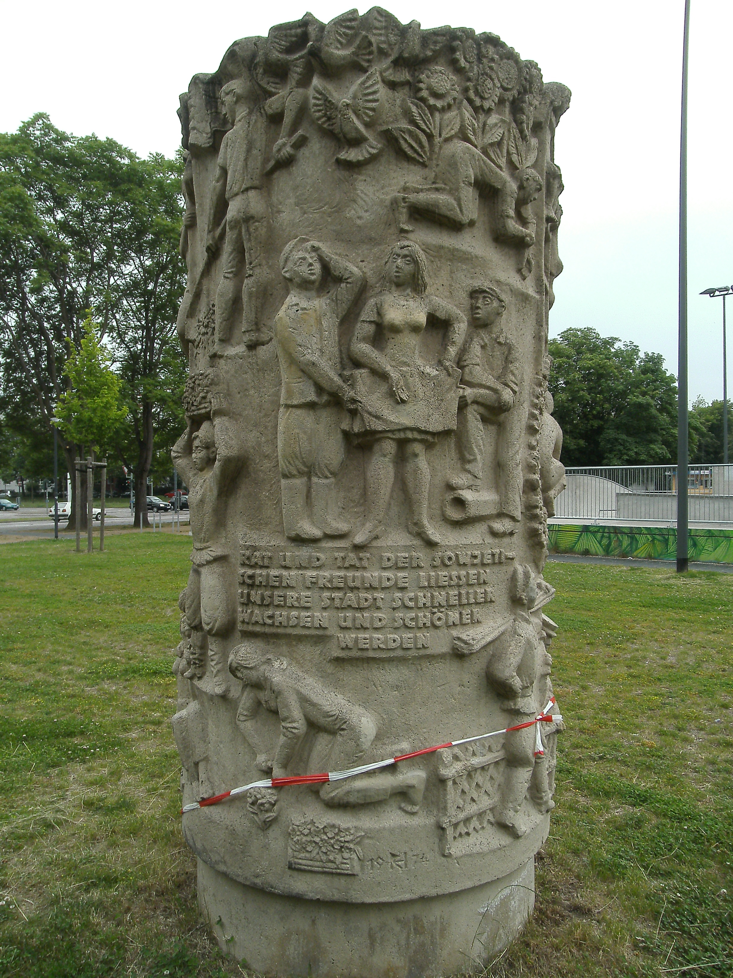 Rudolf Hilscher, Aufbauhelfer, 1974, Kunststeinguss, Reliefsäule Hallorenstraße/An der Magistrale (Aufnahme von SSW)